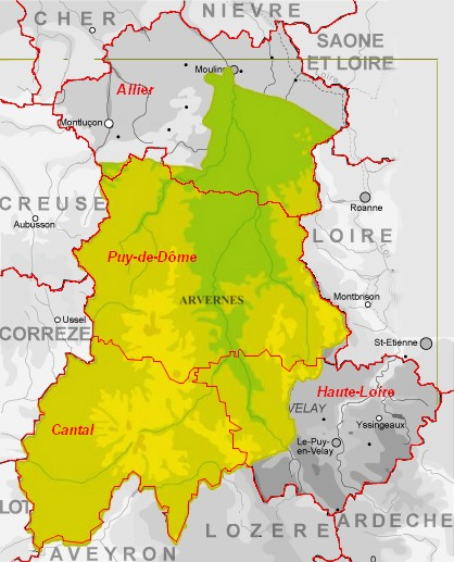 Carte de la cité des arvernes en superposition sur la région administrative d'Auvergne